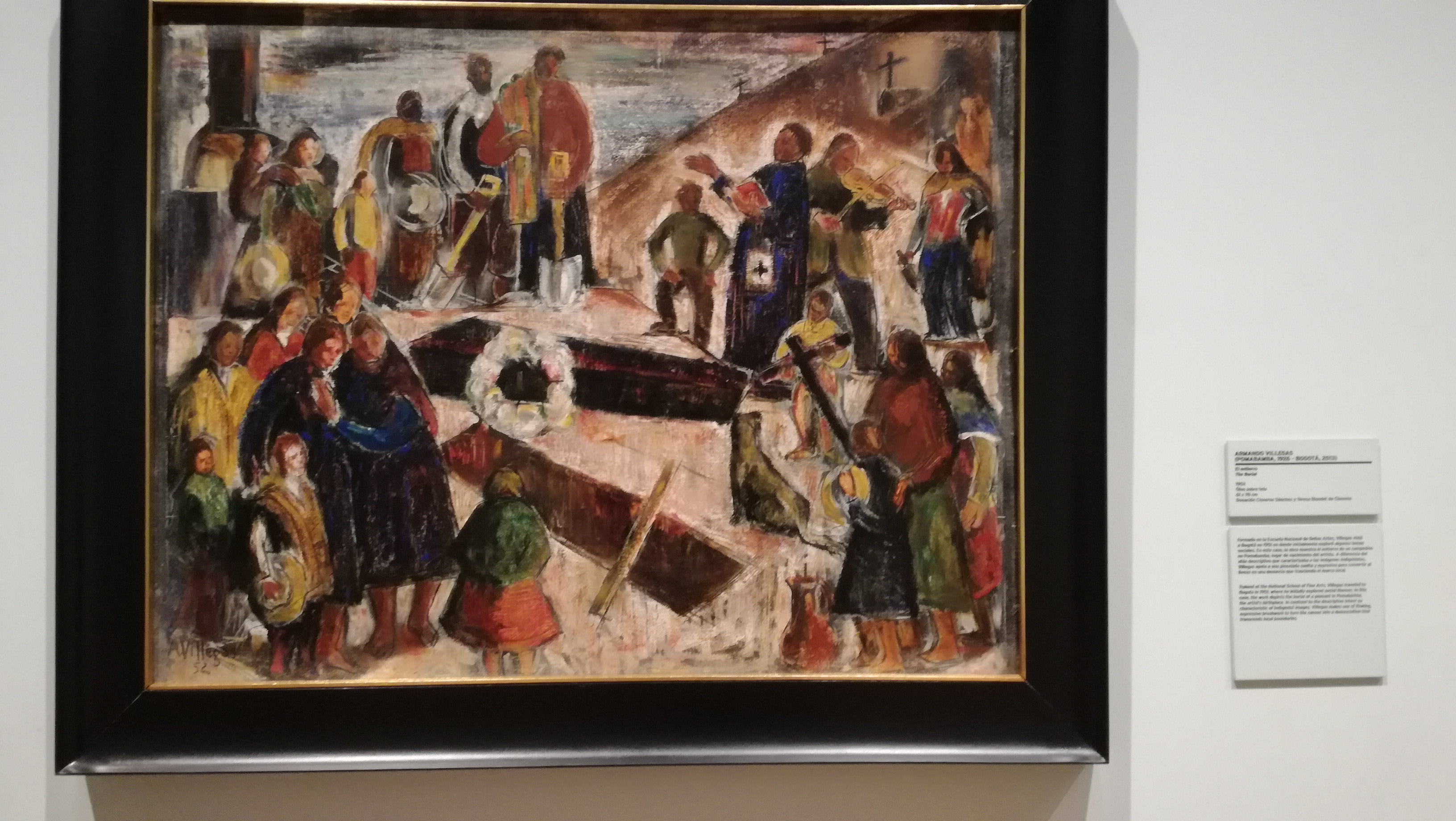 El entierro (1952) - Armando Villegas. Óleo sobre tela.